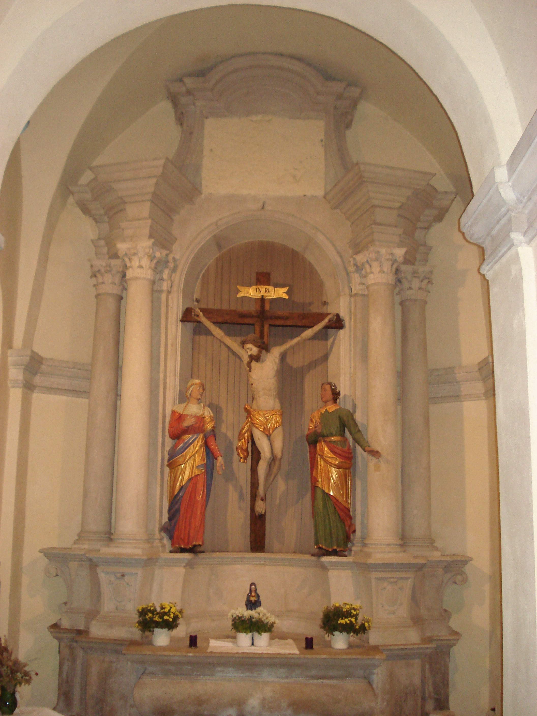 Kai_-_Seitenaltar_1